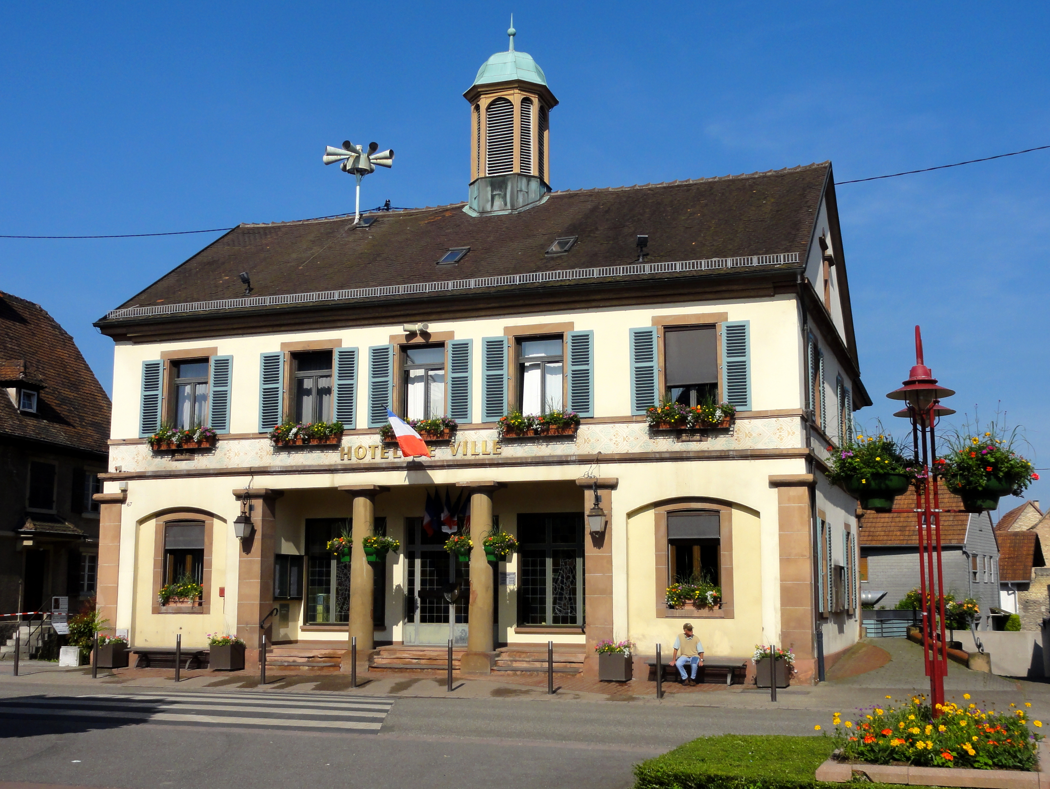 Alsace, Bas-Rhin, Drusenheim, Hôtel de ville (1837), 67 rue du Général-de-Gaulle. .